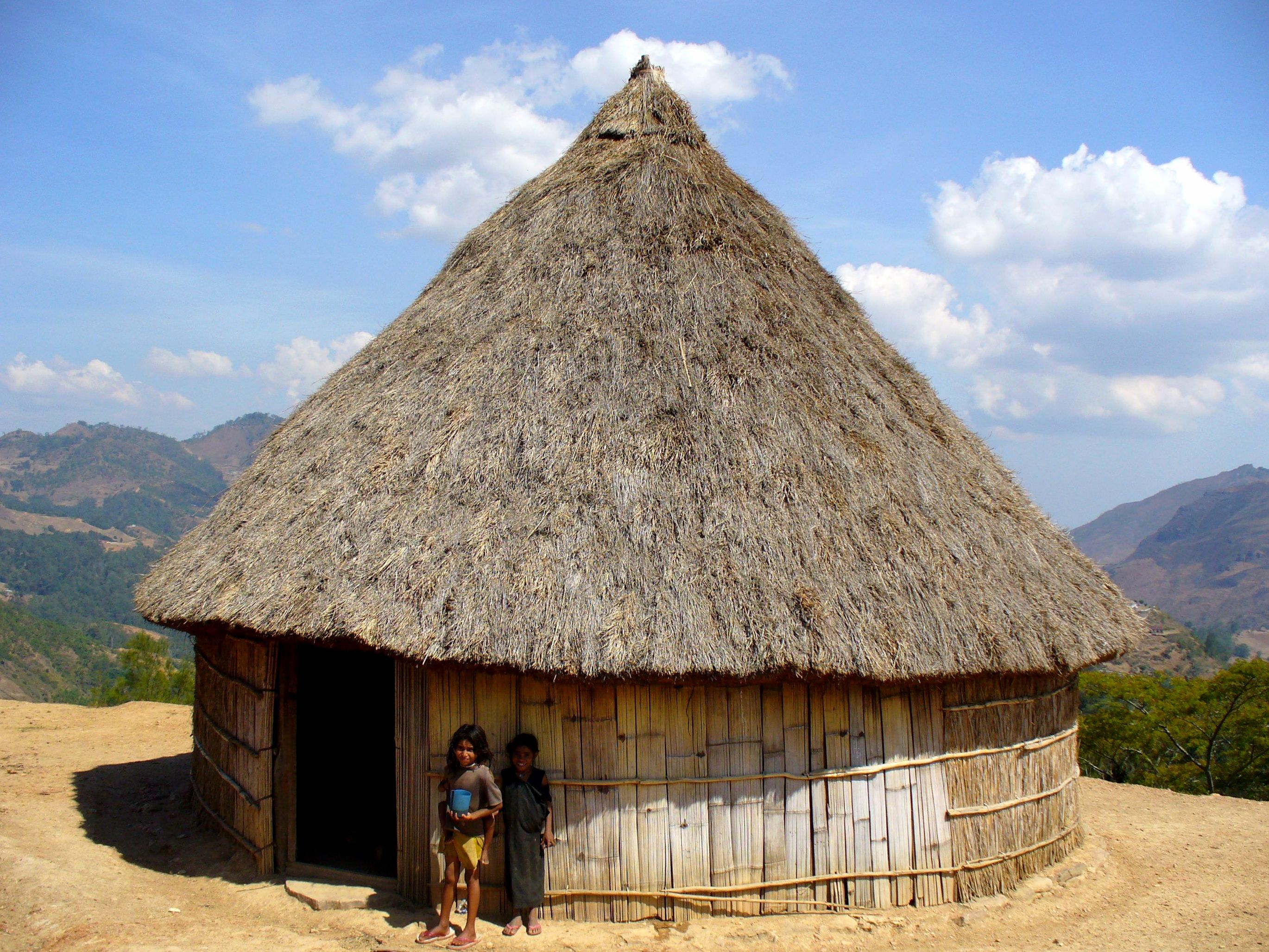 Maubisse, East Timor